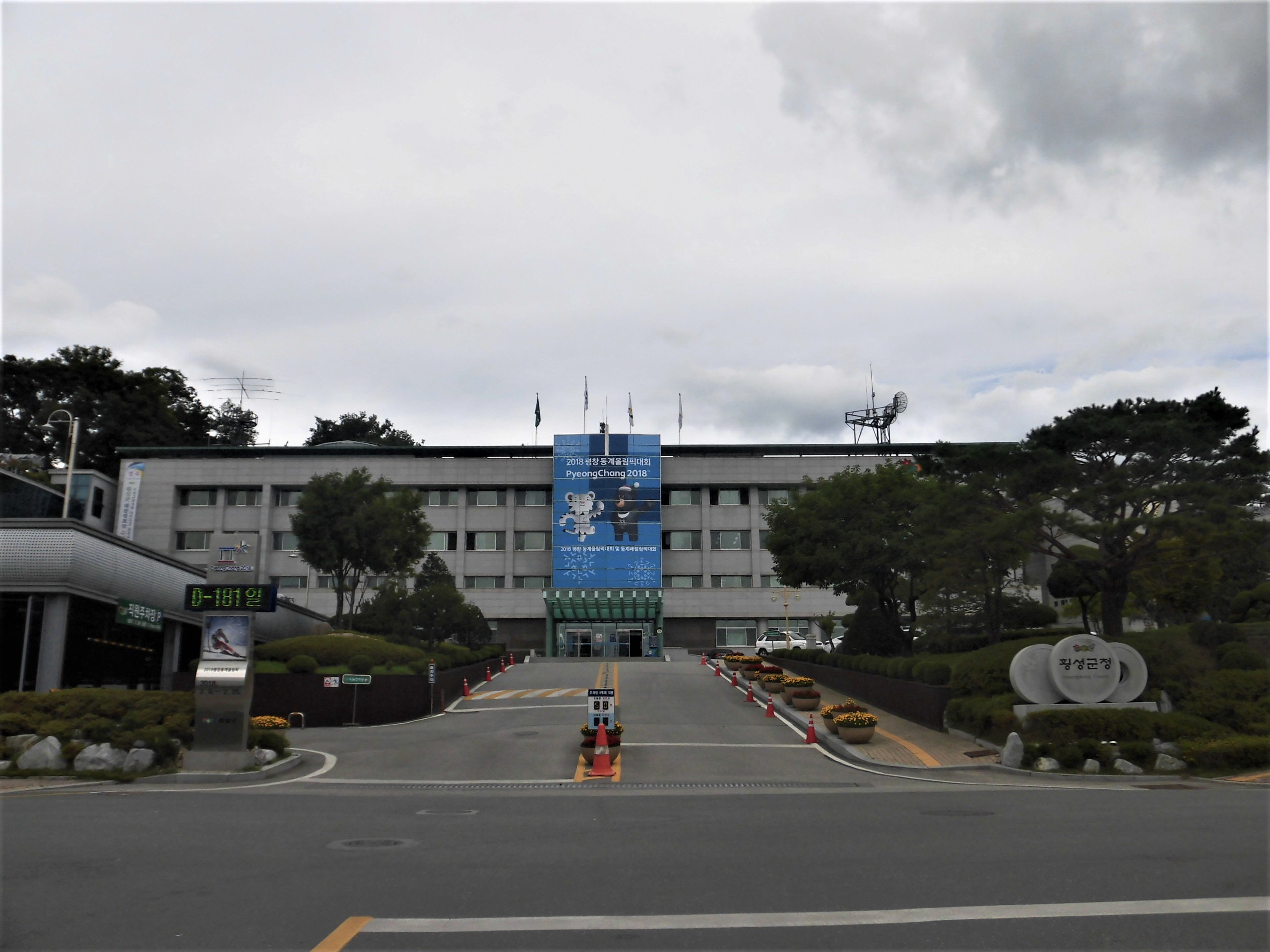 강원도 횡성군에 있는 횡성군청